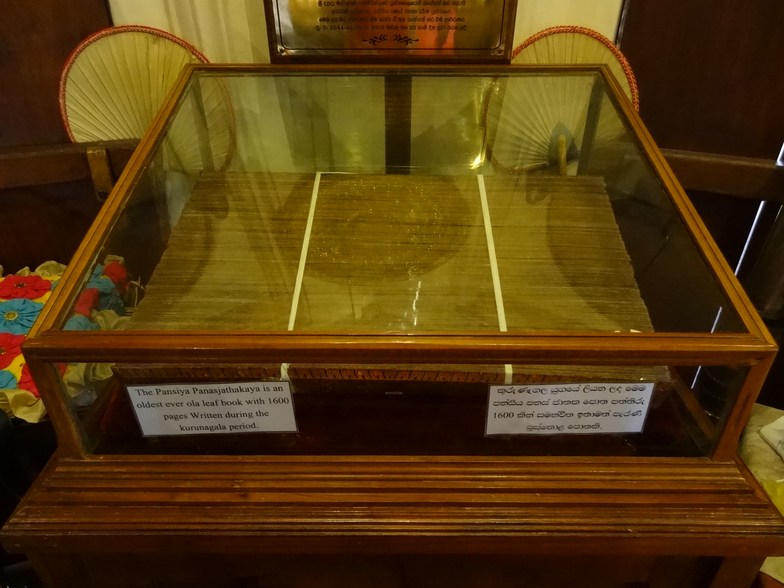 Sri Dalada Maligawa